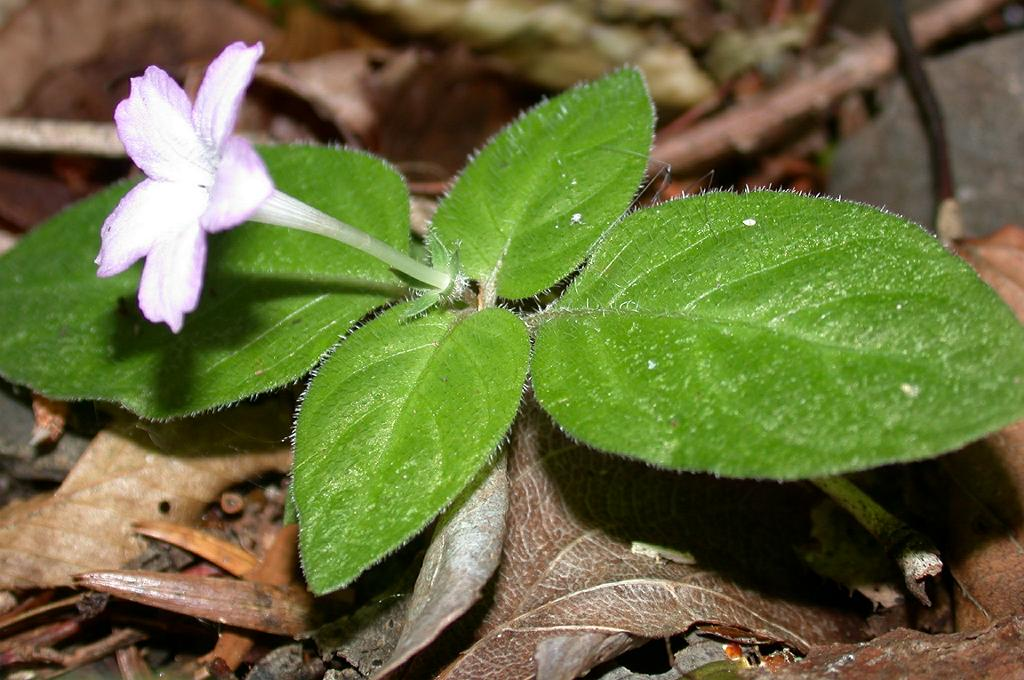 Pseudopyxis depressa：イナモリソウ 2003/06/04 和歌山県田辺市:Tanabe City.Wakayama pref. Japan